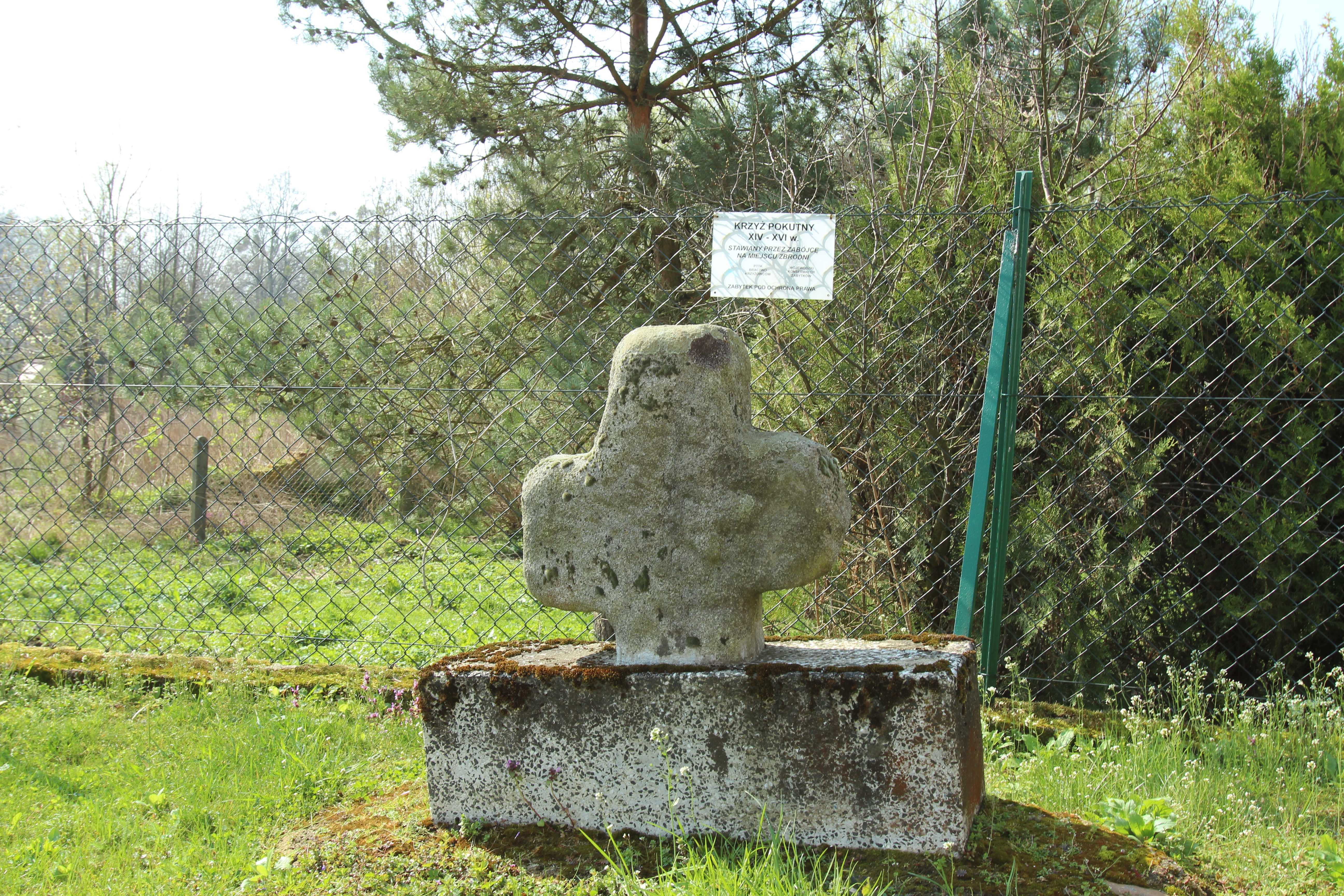 Rynarcice – wieś w Polsce położona w województwie opolskim, w powiecie nyskim, w gminie Korfantów.